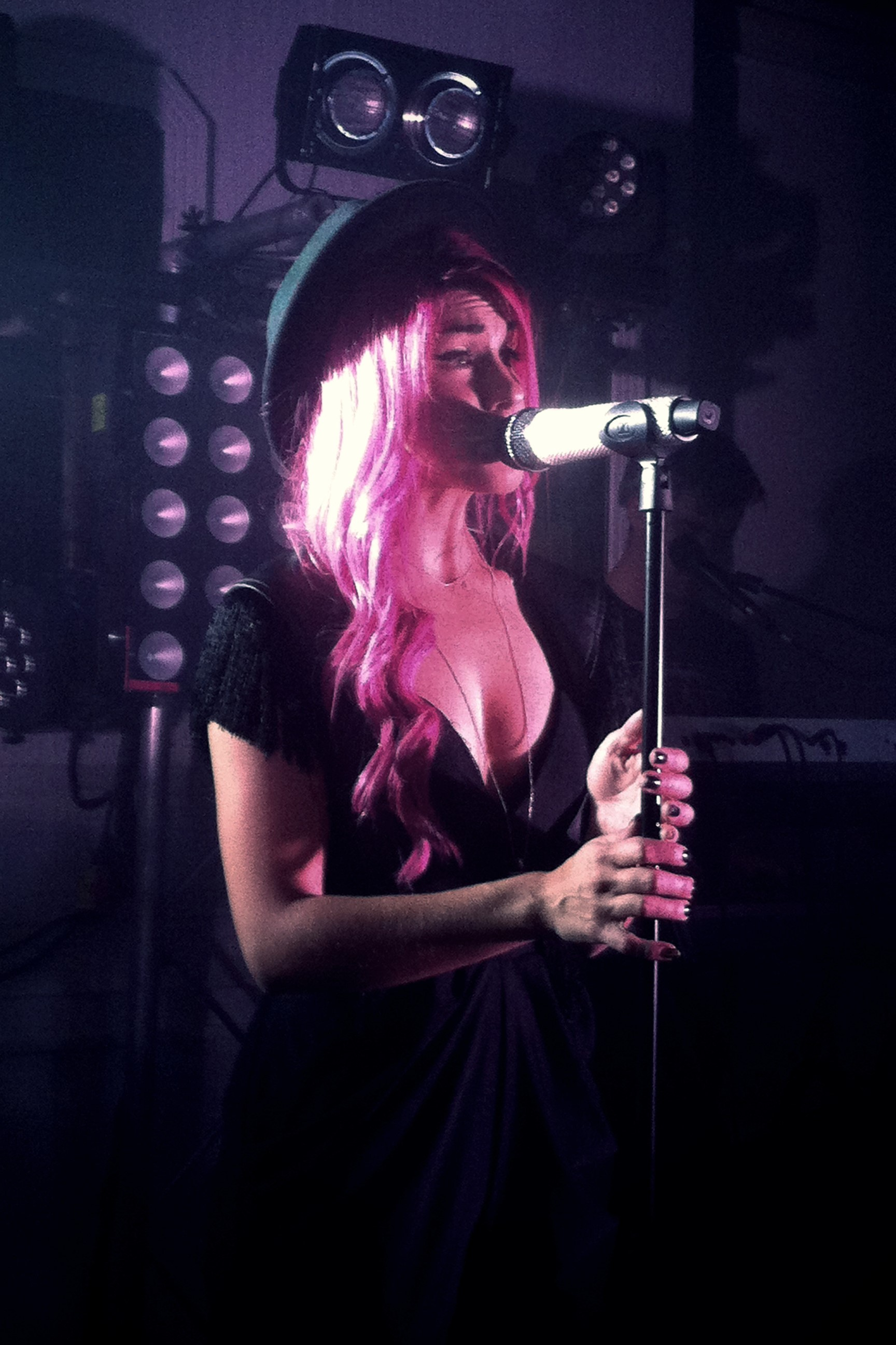 Jannika B esiintymässä Haminan Seurahuoneella 11. lokakuuta 2014